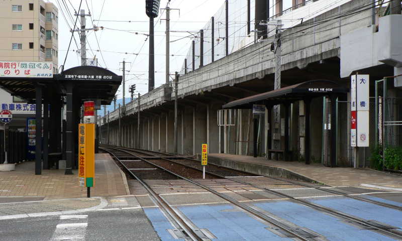 長崎電気軌道、大橋電停